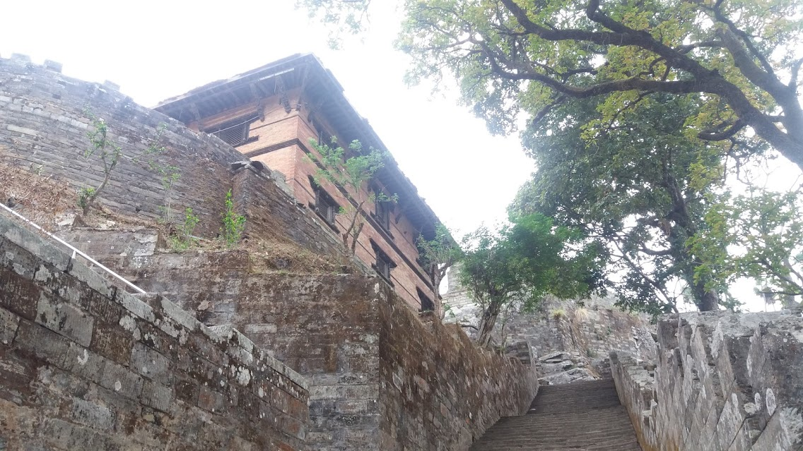 नेपाली: गोरखा दरवार